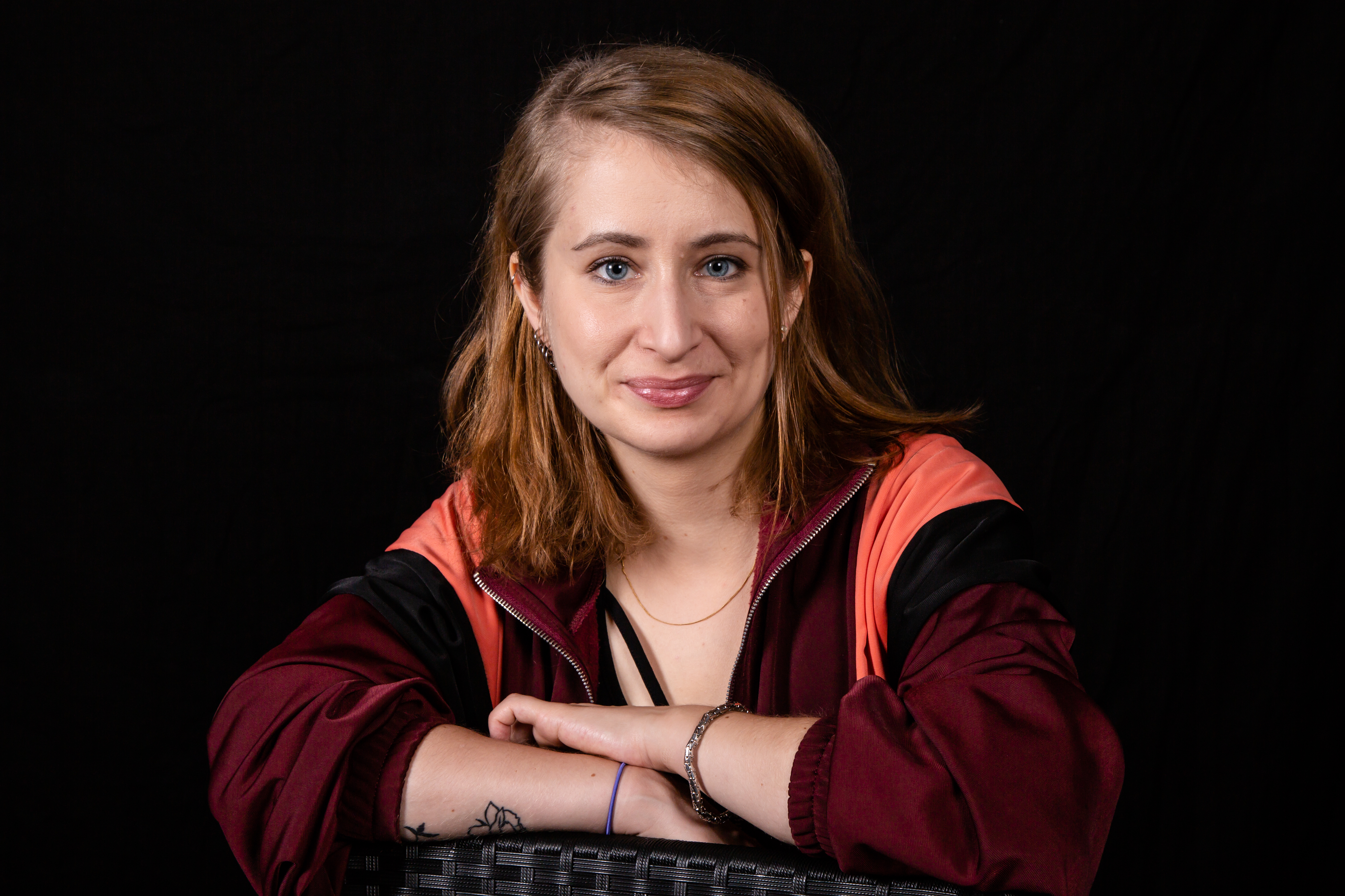 Margarete Stokowski at Frankfurt Bookfair 2018